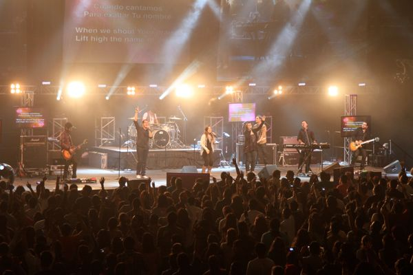 En espíritu y en Verdad durante encuentro 2010